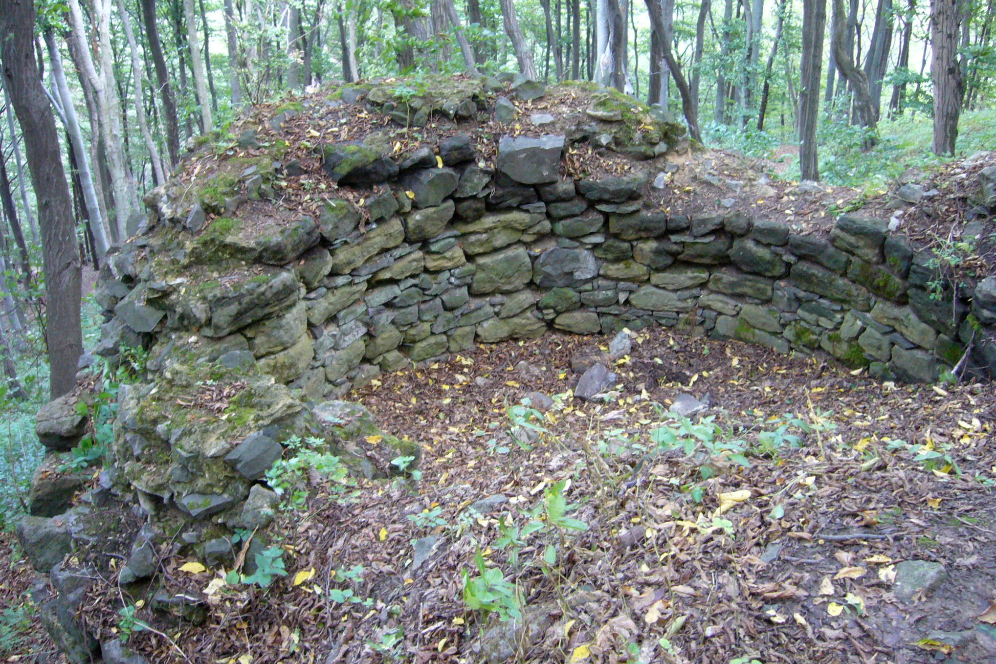 Bašta v severní části předhradí, Hrad Starý Berštejn, Vrchovany.